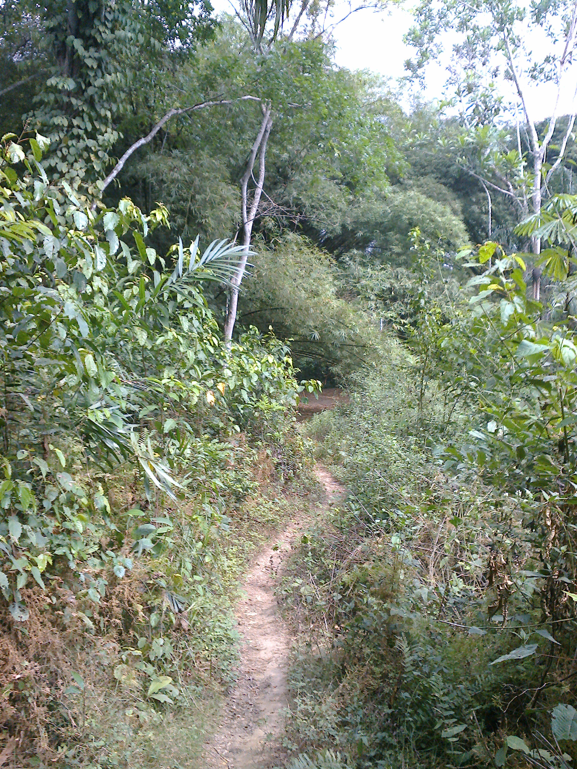 Sentier qui mène à la rivière Ngo Pan du village Mbamblè dans la Sanaga Maritime au Cameroun